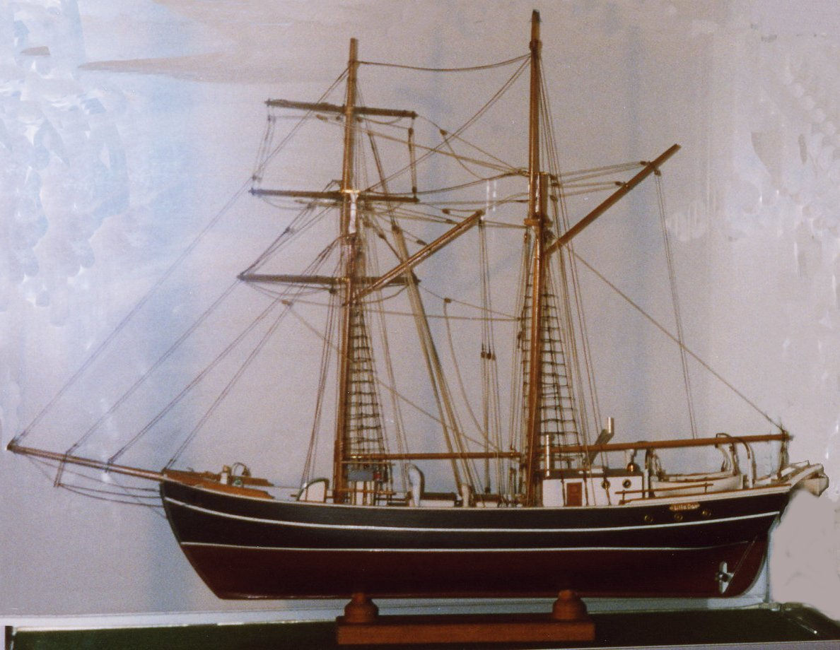 'Lilla Dan' 2 master skonnert bygget af Ove Andersen, Slagelse i 1965. Gave til familiemedlem.